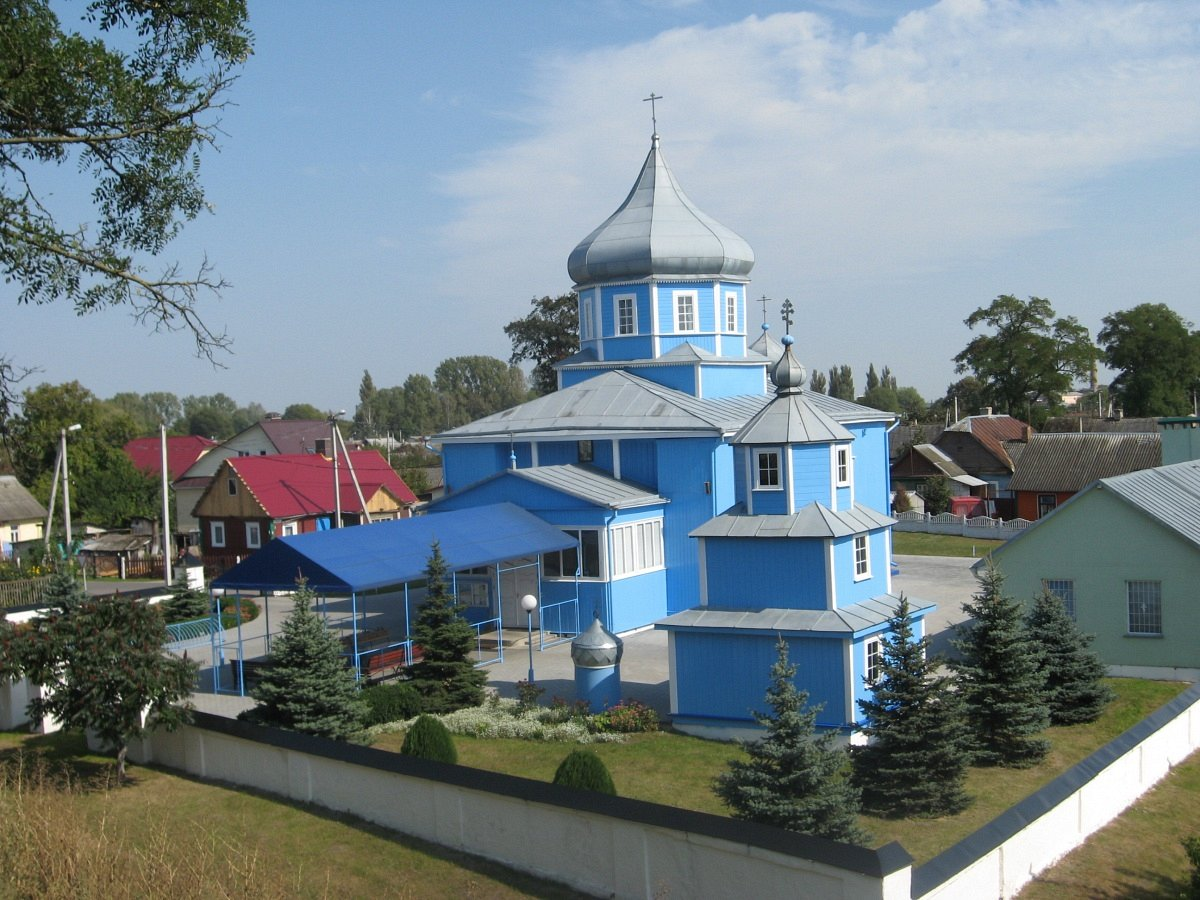 Кобрын. Драўляная царква